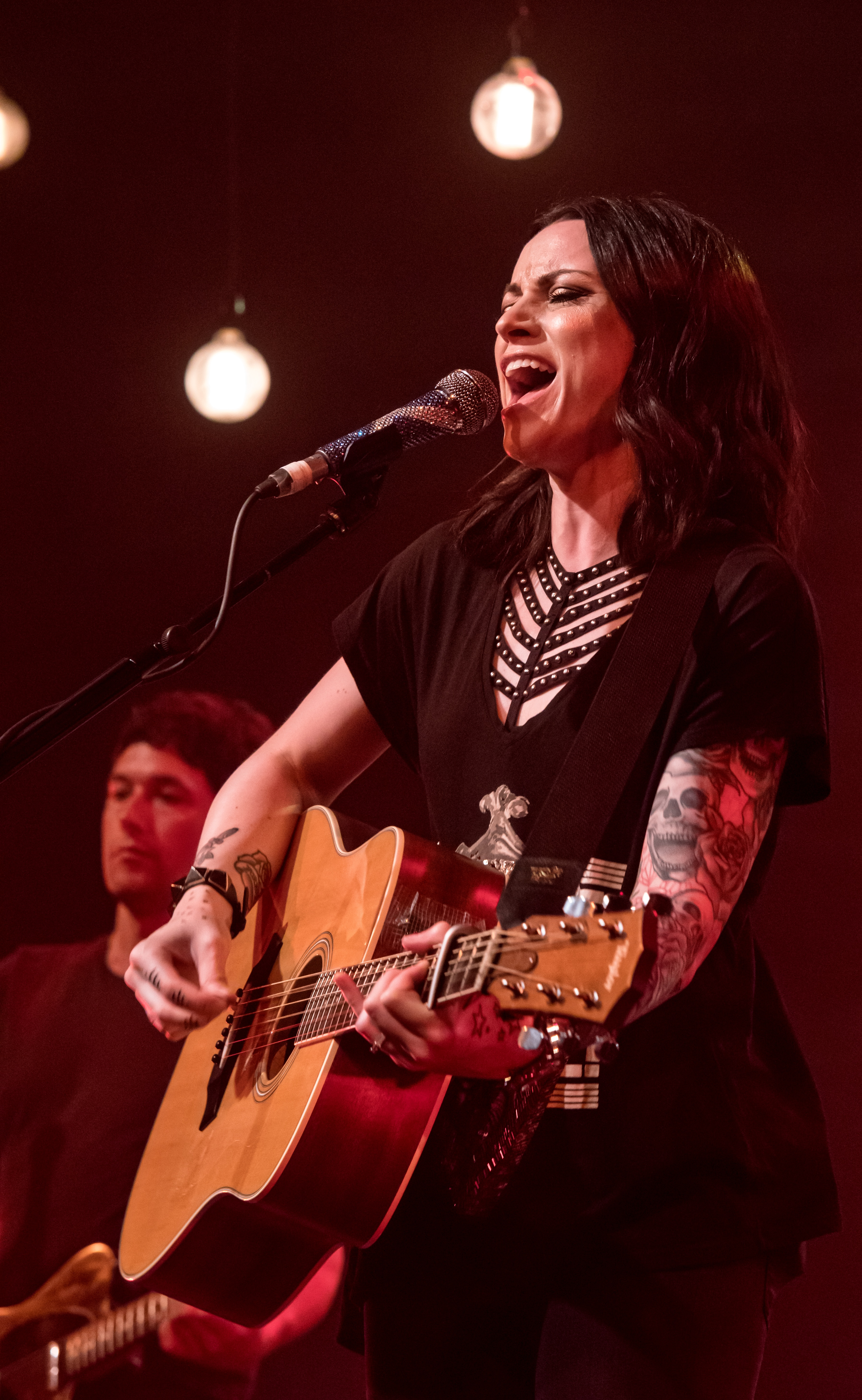 Bilder vom Zelt Musik Festival 2017 in Freiburg im Breisgau